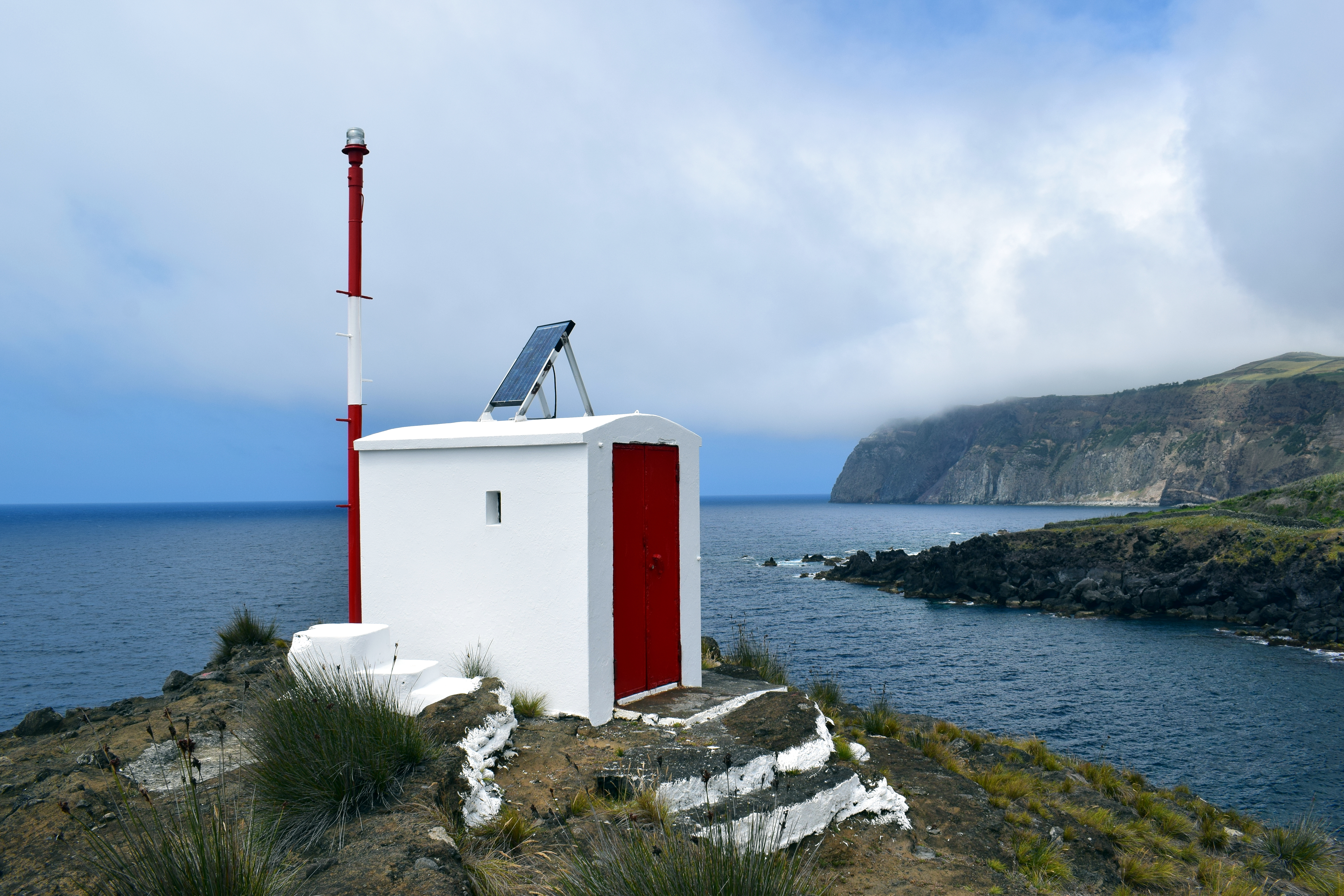 Die Folga-Leuchtbake in der Gemeinde Luz, Graciosa.